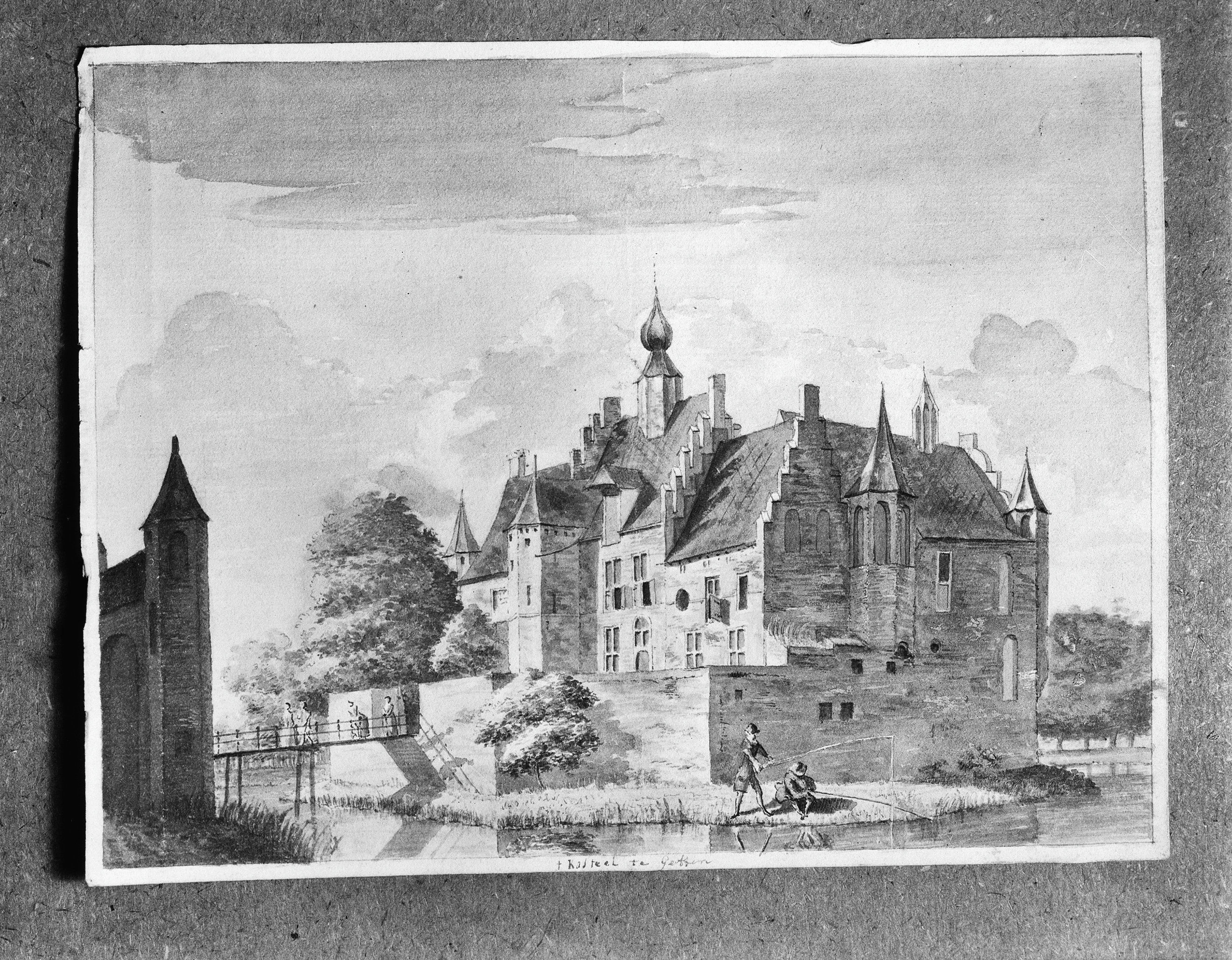 Kasteel: reproductie van tekening tentoonstelling Provinciaal Generaal Den Bosch